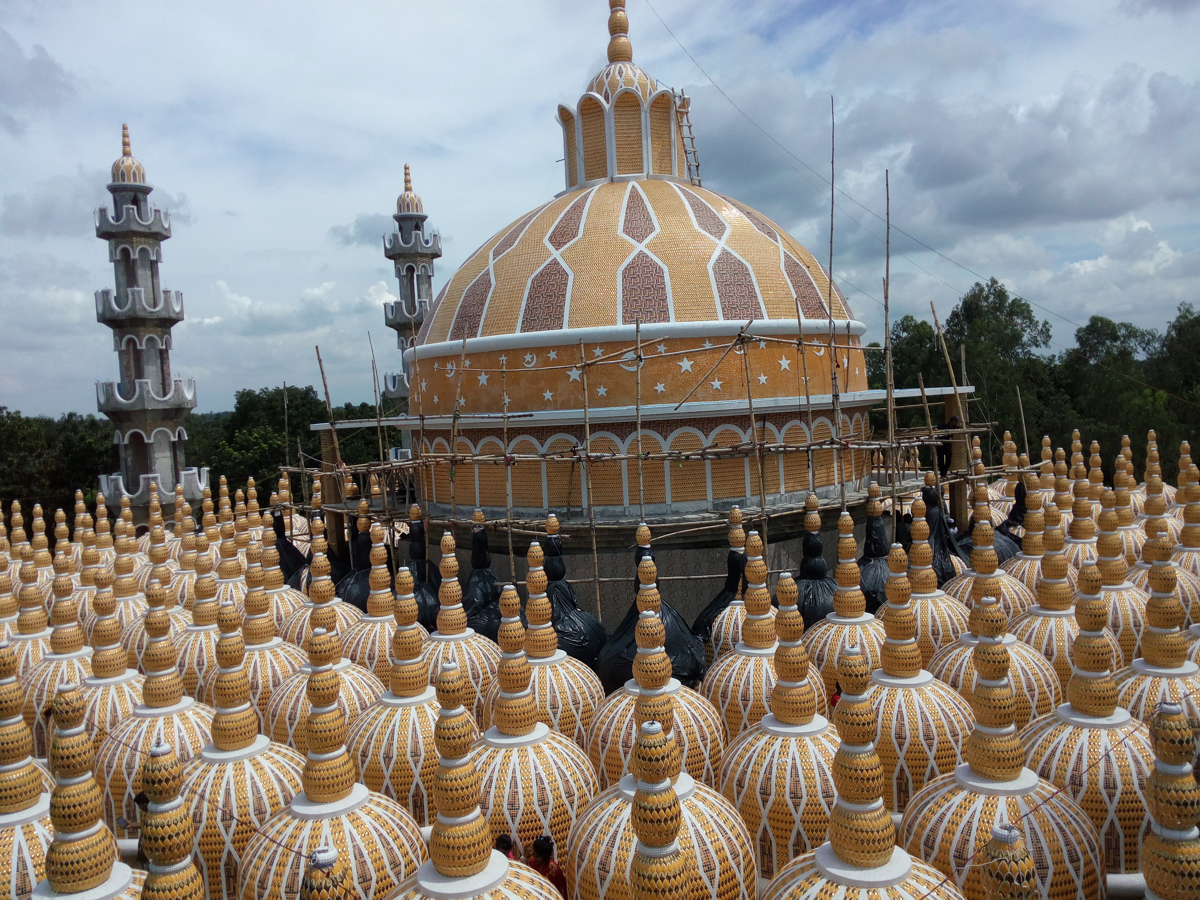 ২০১ গম্বুজ মসজিদটি টাঙ্গাইল জেলার গোপালপুর থানায় অবস্থিত। প্রতিদিন দেশে বিদেশের শত শত দর্শনার্থী মসজিদটি দেখতে ভিড় জমায়। ইতিমধ্যেই মসজিদটি বাংলাদেশের অন্যতম ভ্রমণকেন্দ্র হিসেবে পরিগণিত হয়েছে।